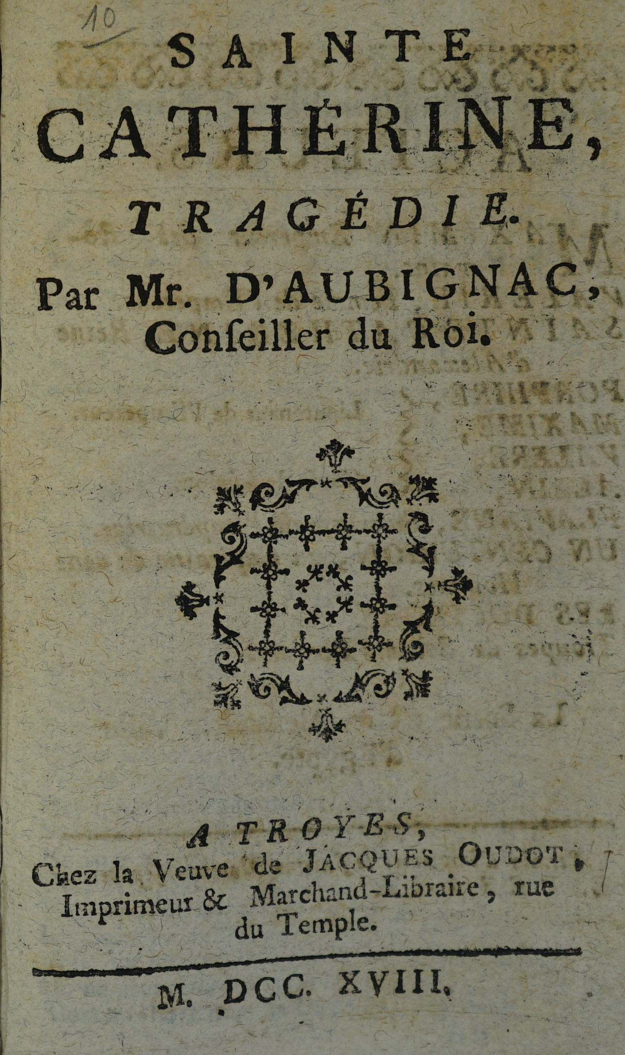 extrait du livre.